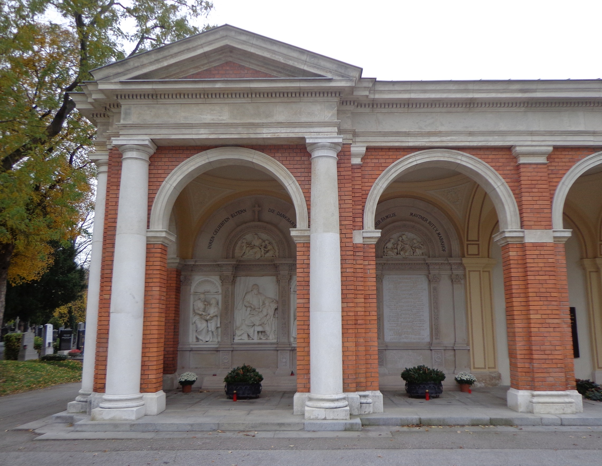 Wiener Zentralfriedhof, Alte Arkaden: Grüfte 35-36: Gräber der Familie von Mautner Markhof